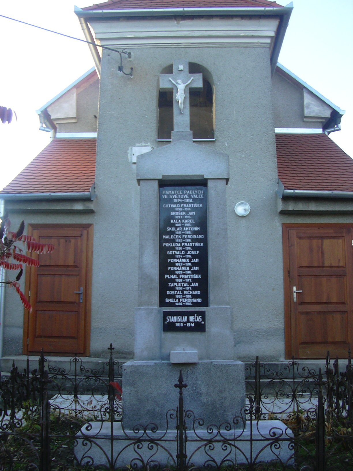 Pomník památce padlých za první světové války před kaplí ve Lhotě (Vyškov) - Czech Republic